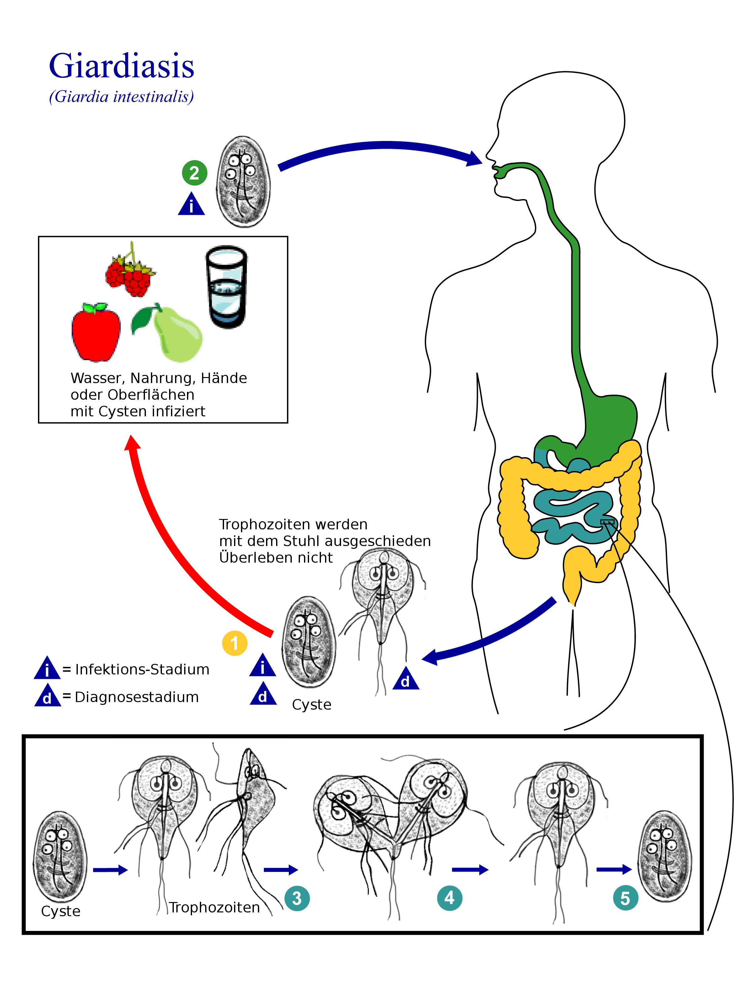 Lebenszyklus von Giardia lamblia